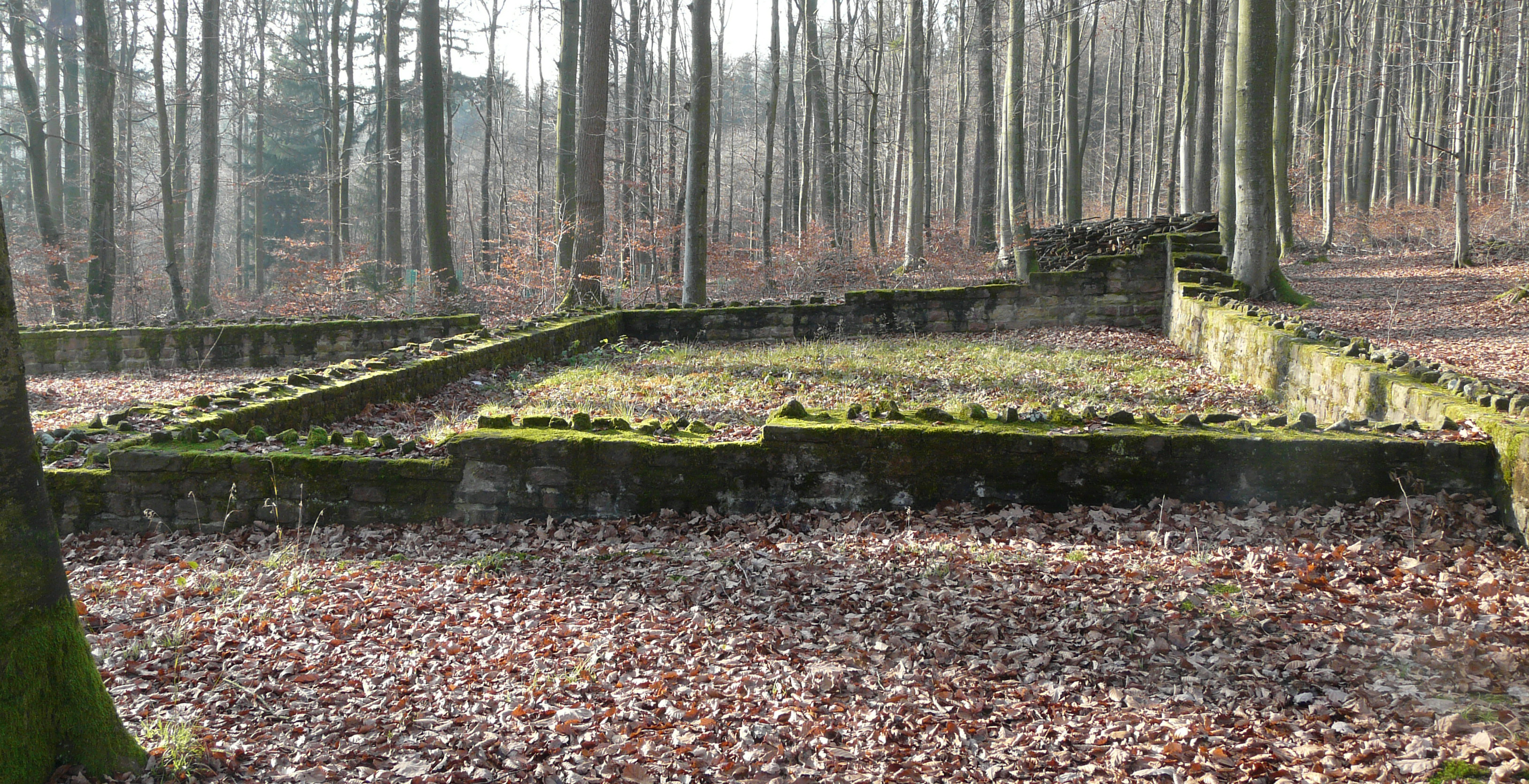 Wirtschaftsgebäude (vermutete Remise) der Villa Rustica von Wiesenbach (Baden)